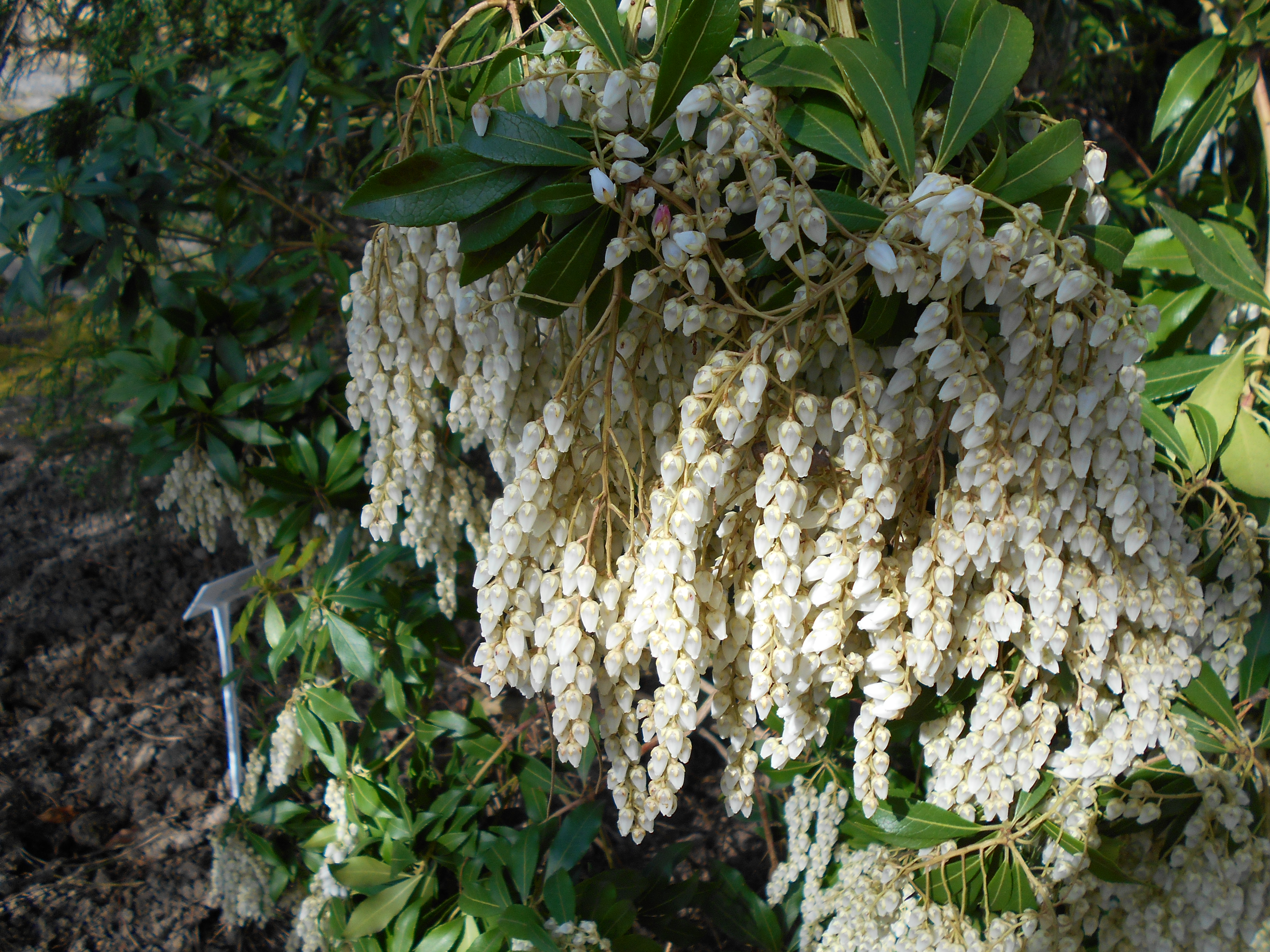 Pieris japoński (Pieris japonica), Ogród Botaniczny UMCS w Lublinie